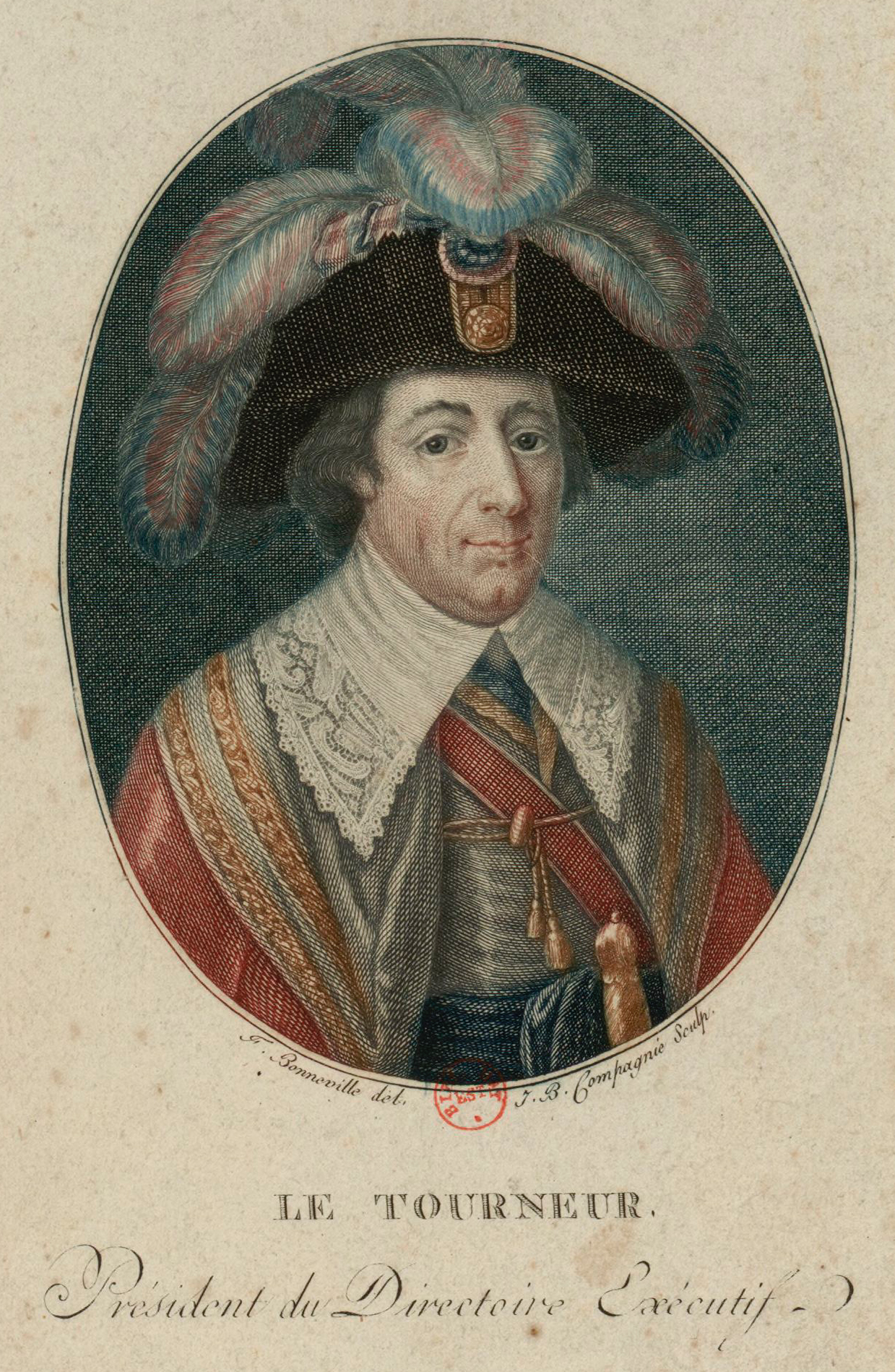 Le Tourneur président du Directoire exécutif (estampe).